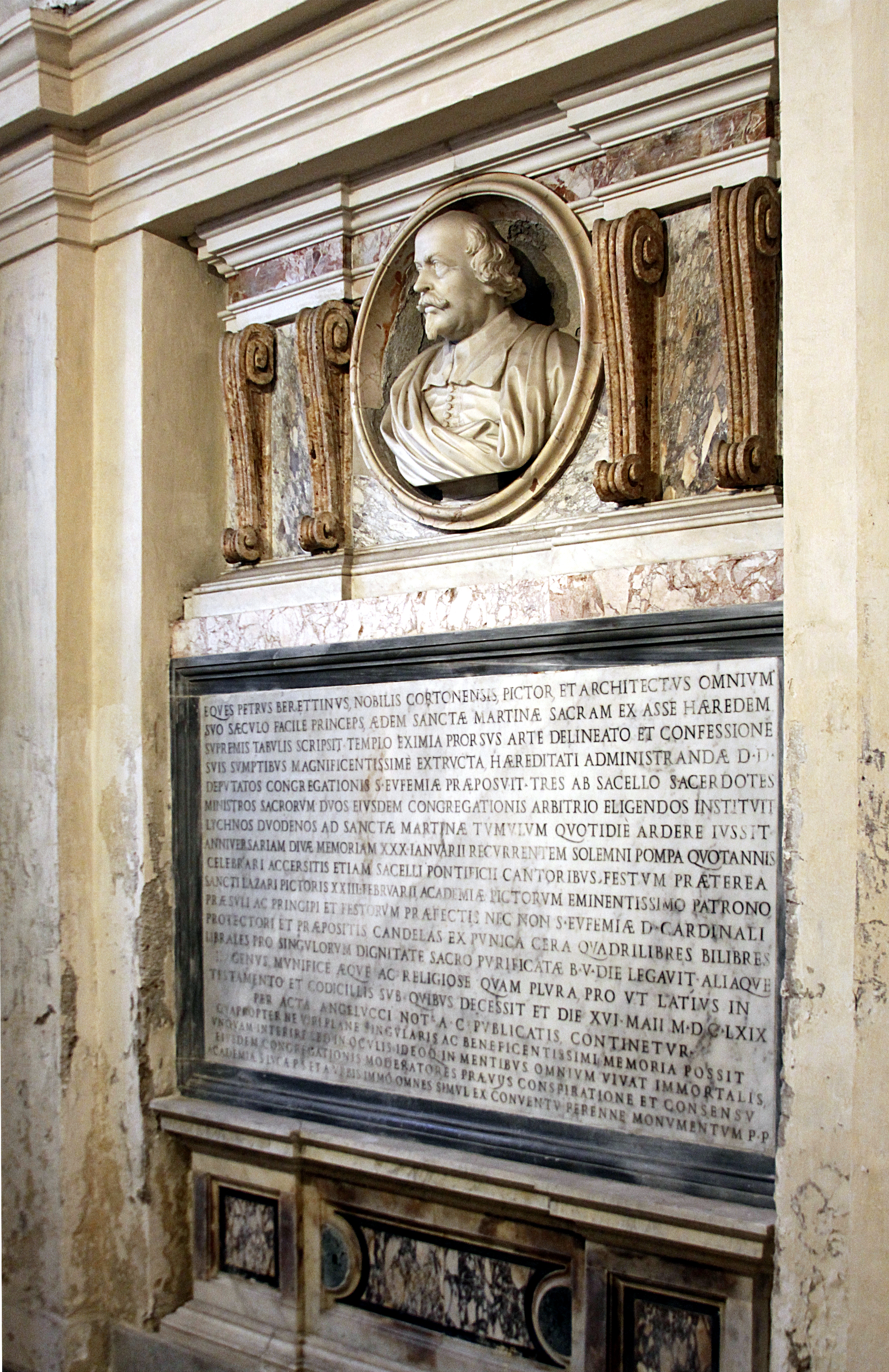 Crypt of Santi Luca e Martina - Rome